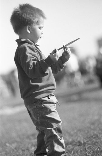 Kindheit. Ein Kind macht sich mit dem Flugverhalten eines Spielzeugflugzeug aus Styropor vertraut. Veröffenticht auf dem Buchtitel der Publikation: Karl Jaspers (2000): Was ist der Mensch? Philosophisches Denken für alle, Piper. ISBN 3492041663